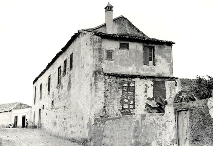 Camino del Durazno. Archivo Municipal.